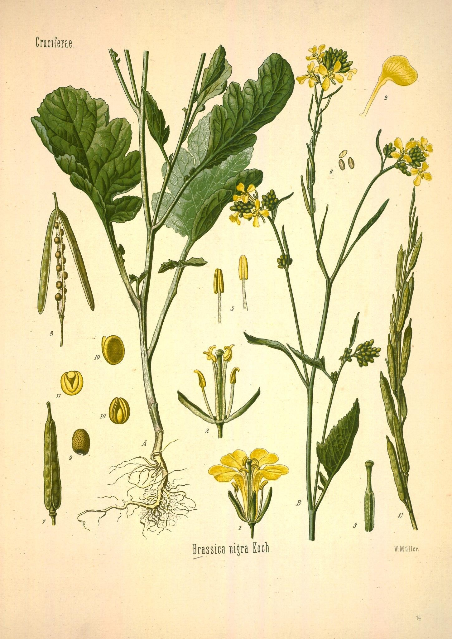 Schwarzer Senf. A B blühende Pflanze, natürl. Grösse; C Fruchttraube, desgl.; 1 Blüthe, vergrössert; 2 dieselbe ohne Kronblätter, desgl.; 3 Fruchtknoten mit Griffel und Narbe, desgl.; 4 Kronblatt, desgl.; 5 Staubgefässe desgl.; 6 Pollenkörner, desgl.; 7 Frucht, desgl.; 8 dieselbe aufgesprungen, desgl.; 9 Same, desgl.; 10, 11, 12 derselbe ohne Samenschale, desgl.